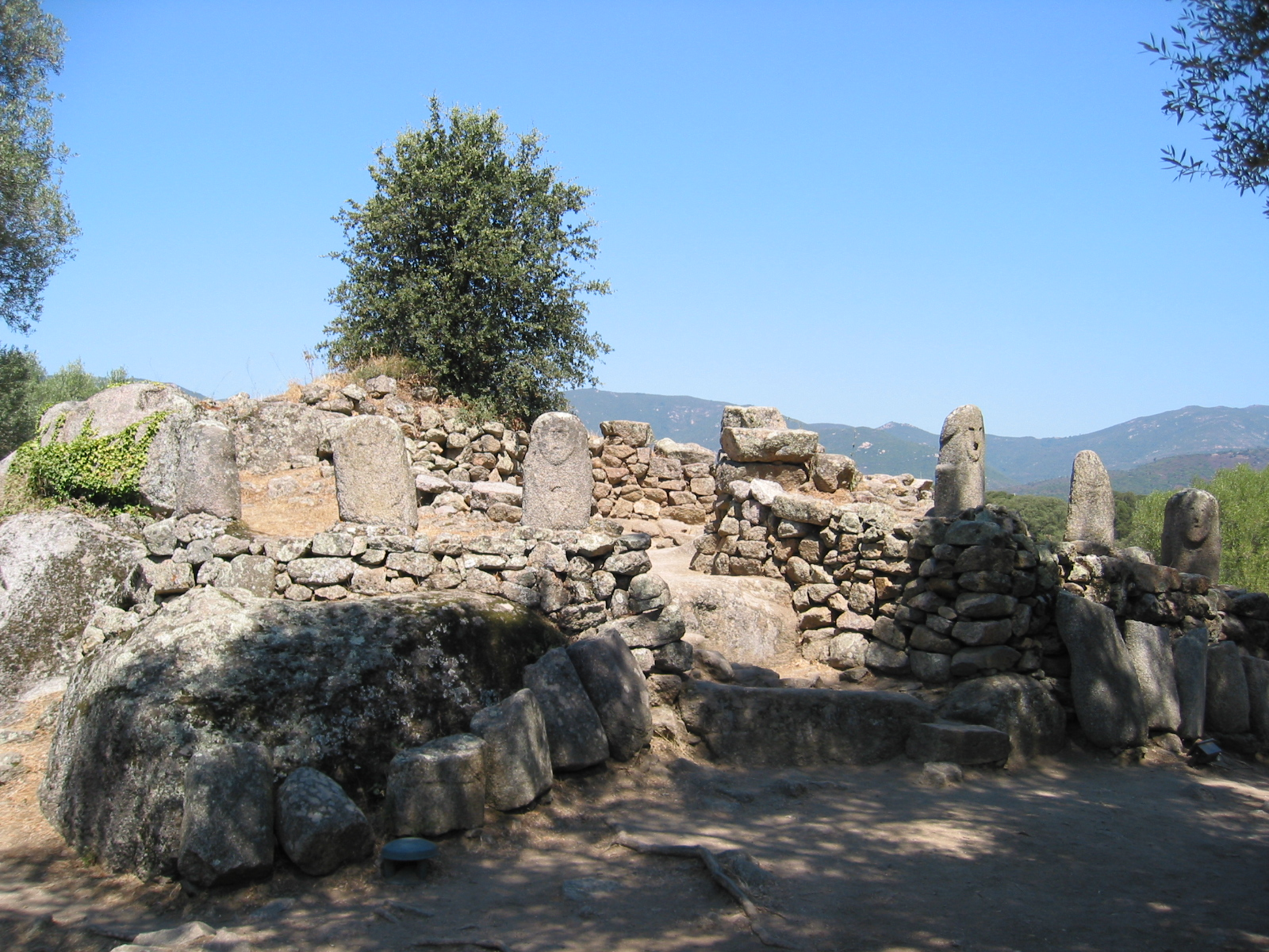 Filitosa (Corse-du-Sud, France)